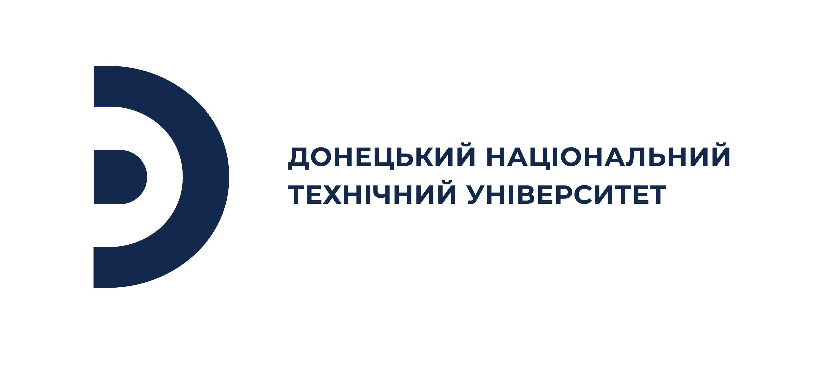 Офіційний логотип Донецького національного технічного університету (ДонНТУ)